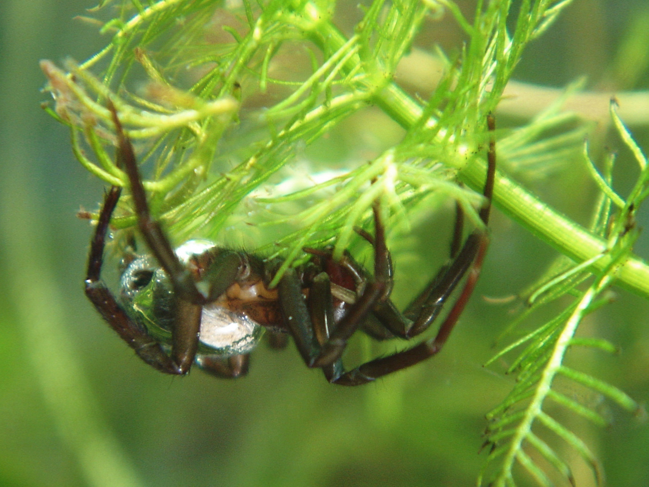 Weibchen der Wasserspinne Argyroneta aquatica. Fundort: Wien Prater. Aquarienaufnahme.